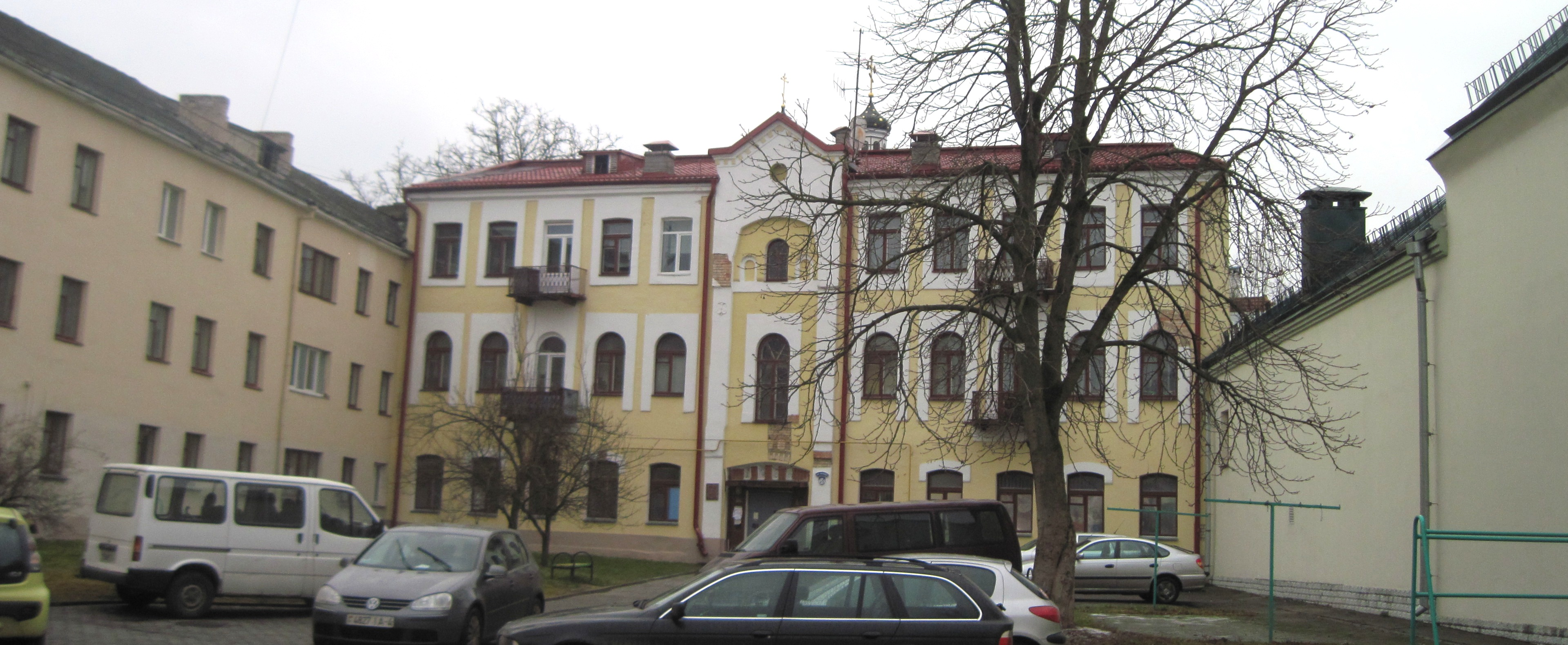 Беларуская (тарашкевіца): Будынак па Замкавай, 14, Гродна